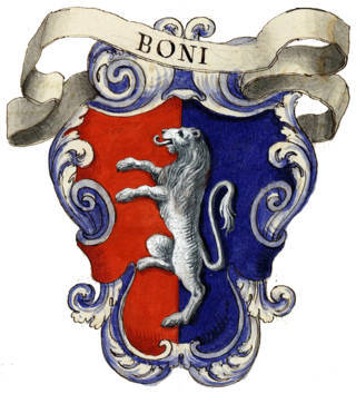 Partito di rosso e d'azzurro, al leone d'argento attraversante.